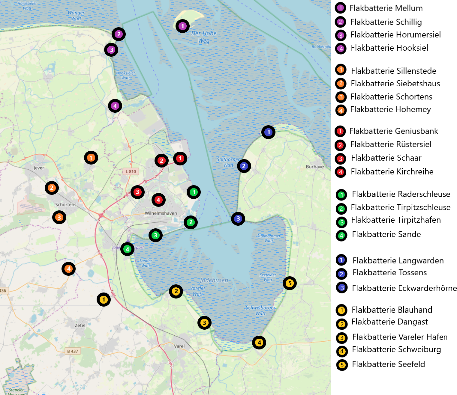 Marineflakabteilung 212 (Wilhelmshaven, Fortifikationsstraße) mit Flakbatterie Kirchreihe, Flakbatterie Geniusbank, Flakbatterie Rüstersiel und Flakbatterie Schaar Marineflakabteilung 222 (Vareler Hafen) mit Flakbatterie Seefeld, Flakbatterie Schweiburg, Flakbatterie Dangast, Flakbatterie Vareler Hafen, Flakbatterie Blauhand und der schwimmenden Flakbatterie Medusa Marineflakabteilung 232 (Wilhelmshaven, Westwerft) mit Flakbatterie Tirpitzhafen, Flakbatterie Tirpitzschleuse, Flakbatterie Raederschleuse und Flakbatterie Sande Marineflakabteilung 252 (Heidmühle) mit Flakbatterie Hohemey, Flakbatterie Schortens, Flakbatterie Siebetshaus und Flakbatterie Sillenstede Marineflakabteilung 262 (Wilhelmshaven, Schleusen/Westwerft), am 1. November 1943 aufgelöst, Übergabe der Flakbatterien Sande, Tirpitzhafen und Tirpitzschleuse an Marineflakabteilung 232. Marineflakabteilung 272 (Tossens) mit Flakbatterie Kilwa, Flakbatterie Eckwarderhörne und Flakbatterie Langwarden Marineflakabteilung 282 (Hooksiel) mit Flakbatterie Schillig, Batterie Horumersiel, Flakbatterie Hooksiel, Flakbatterie Sillenstede, Flakbatterie Mellum und der schwimmenden Flakbatterie Arcona